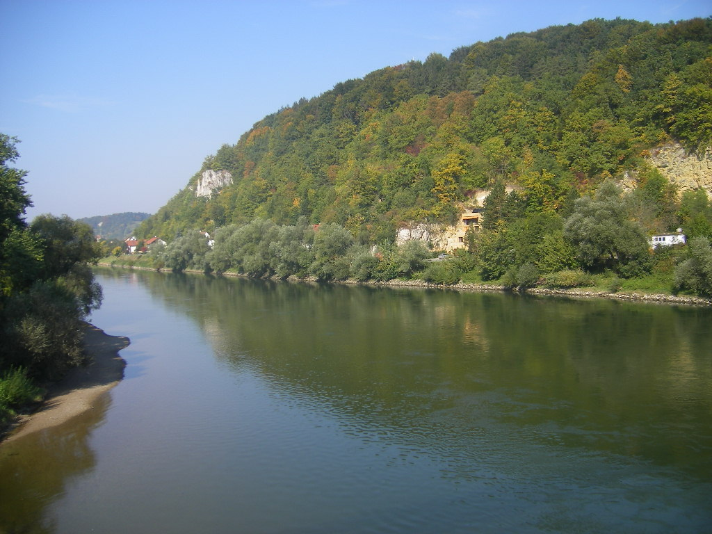 Danube in Bad Abbach